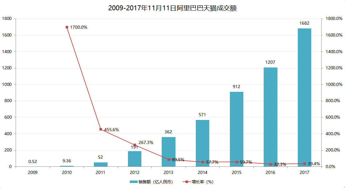 中文（中国大陆）: 2009-2017年阿里巴巴（天猫）11日11日（也被称为双十一购物狂欢节、光棍节）全天交易额变化图示。